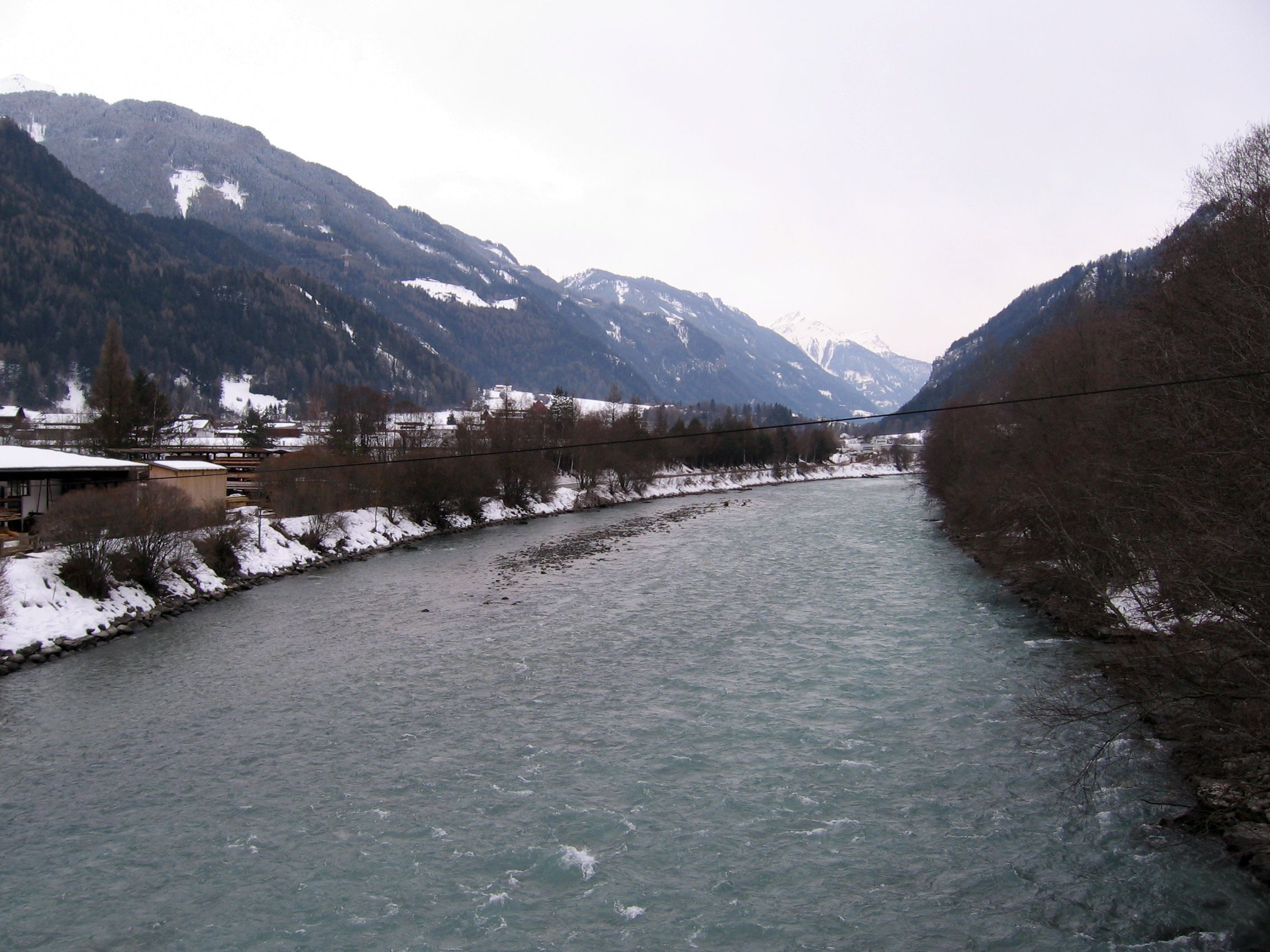 Zu sehen ist der Fluss Inn bei Ried im Oberinntal (Tirol, Österreich)